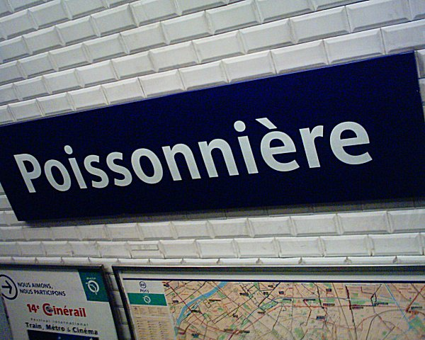 Station Poissonnière du Métropolitain de Paris.